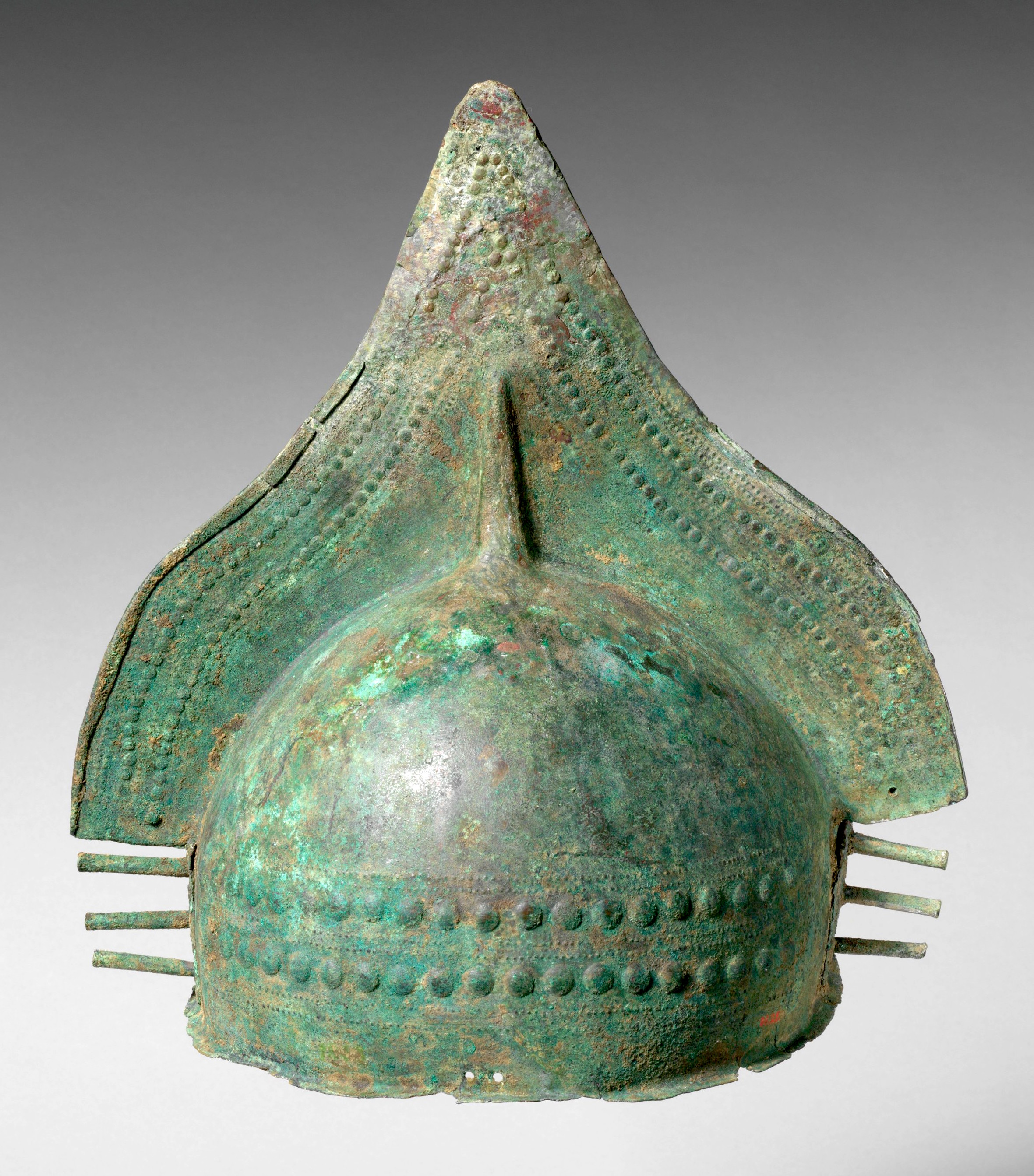 Villanovan; Helmet; Bronzes